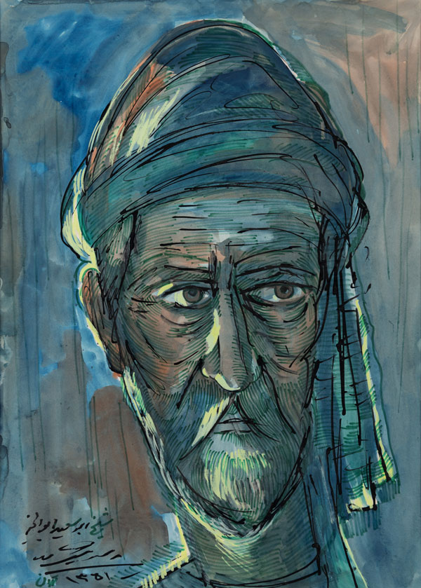 شیخ ابوسعید ابوالخیر